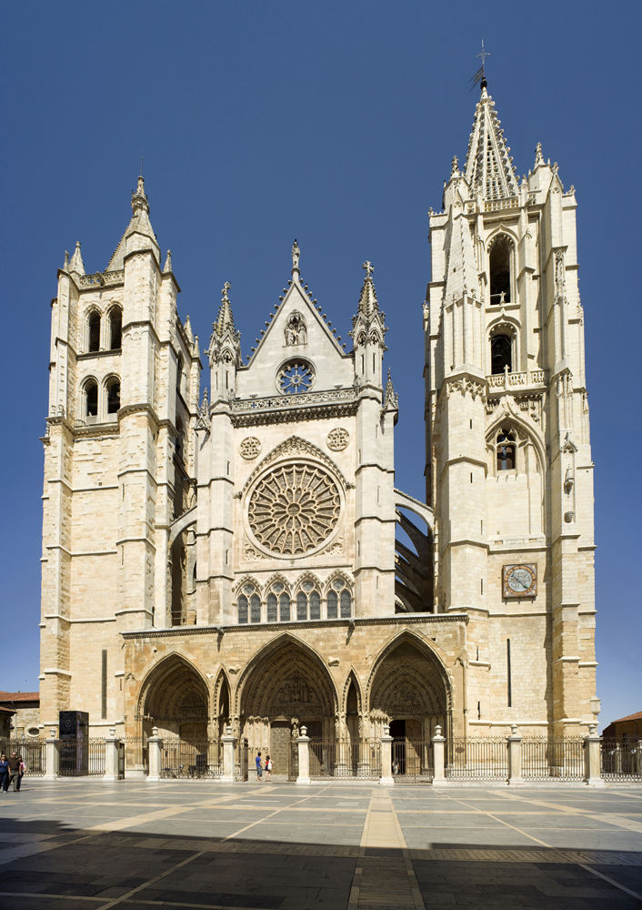 unidentified Spain